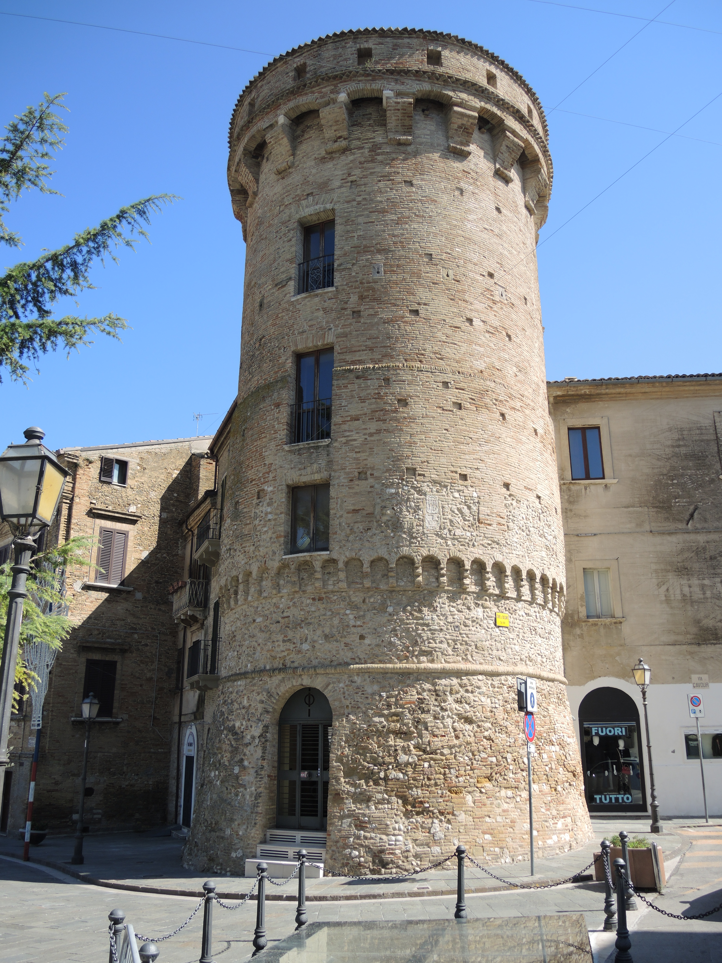 Torre Bassano This is a photo of a monument which is part of cultural heritage of Italy.